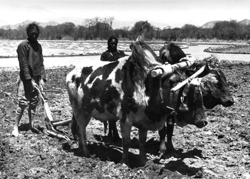 Schigatse-Taktse, pflügende Bauern mit Bastarden von Yak und Zebu